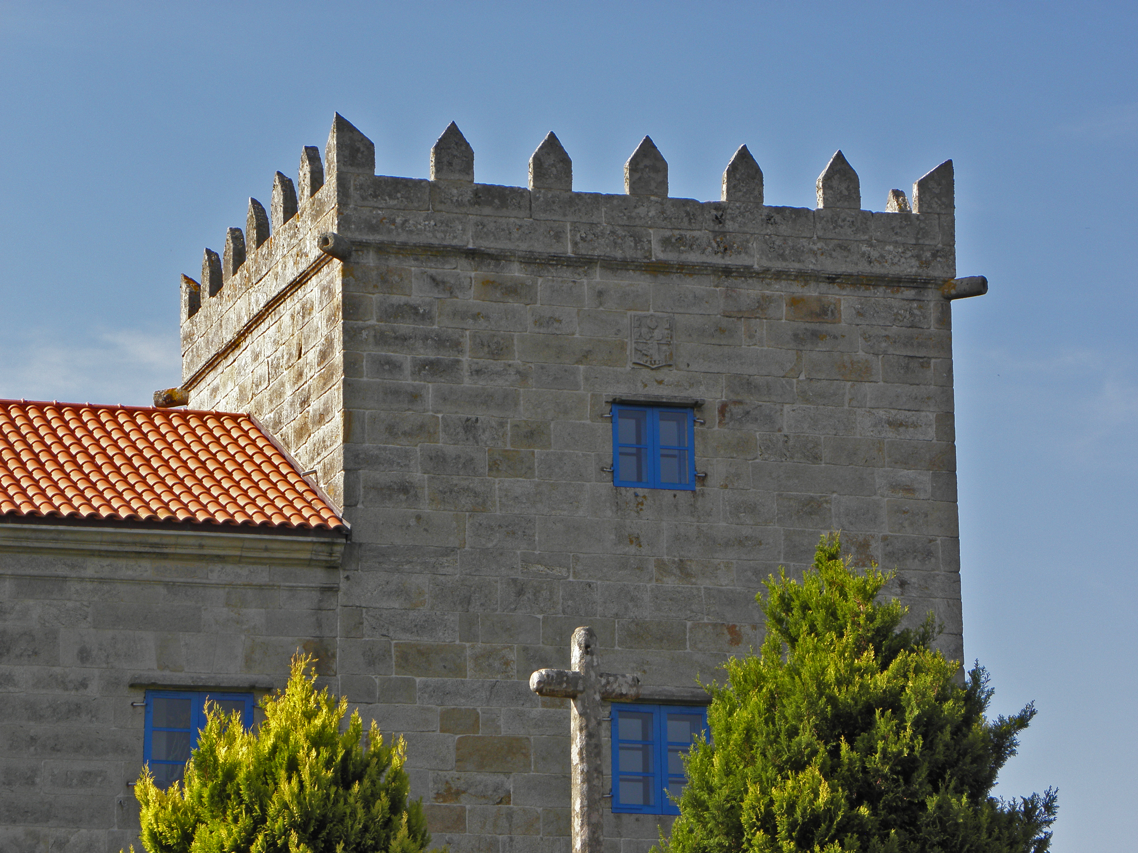 Torres de Cereixo. Propiedade privada non visitable. Encravado sobre a Ría domina o núcleo urbano de Cereixo. Está sobre unha pequena península con ponte de acceso. De aspecto militar, dúas torres ameadas con corpo central uníndoas; os muros de cadeirado. Na fachada principal escudo blasonado. Forma un conxunto de grandes dimensións.(turgalicia)